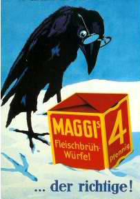 Maggi Reklamm vun 1920